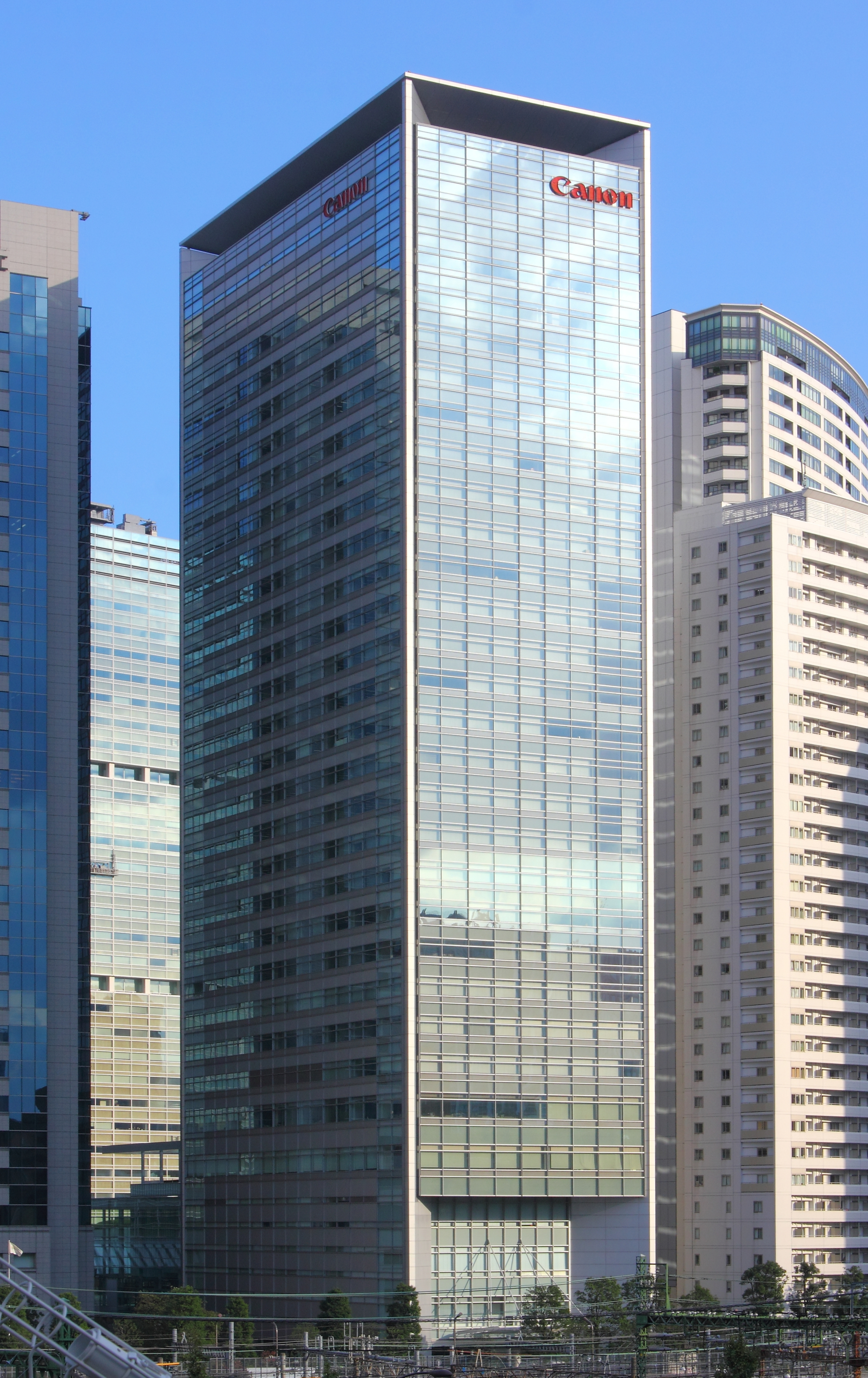 キャノンSタワー(東京都港区)